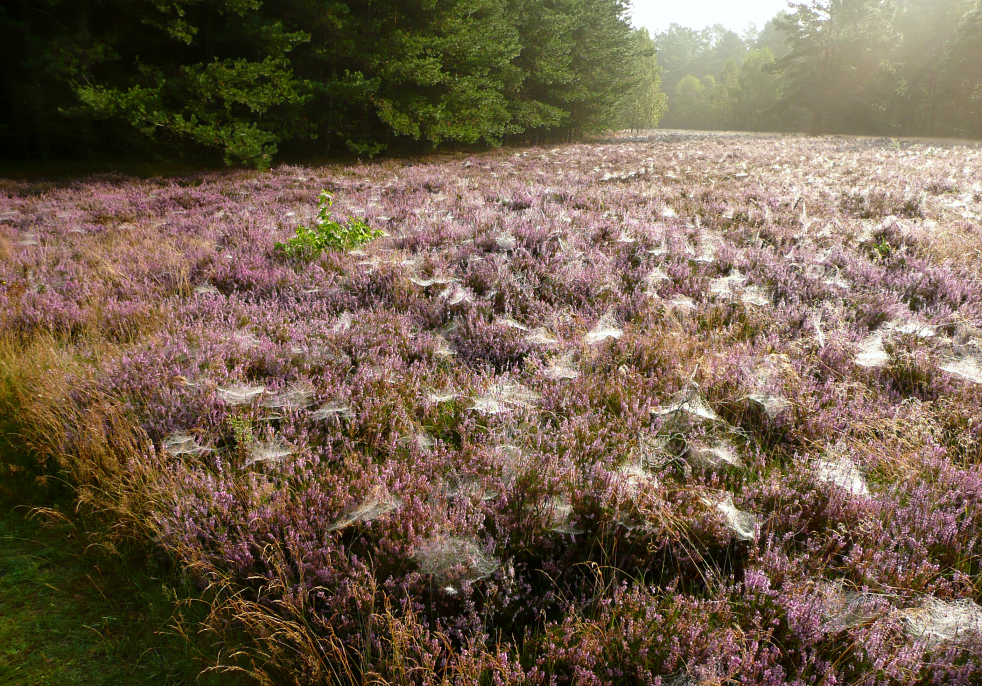 Spinnenetze auf Heidefläche bei Camp Reinsehlen